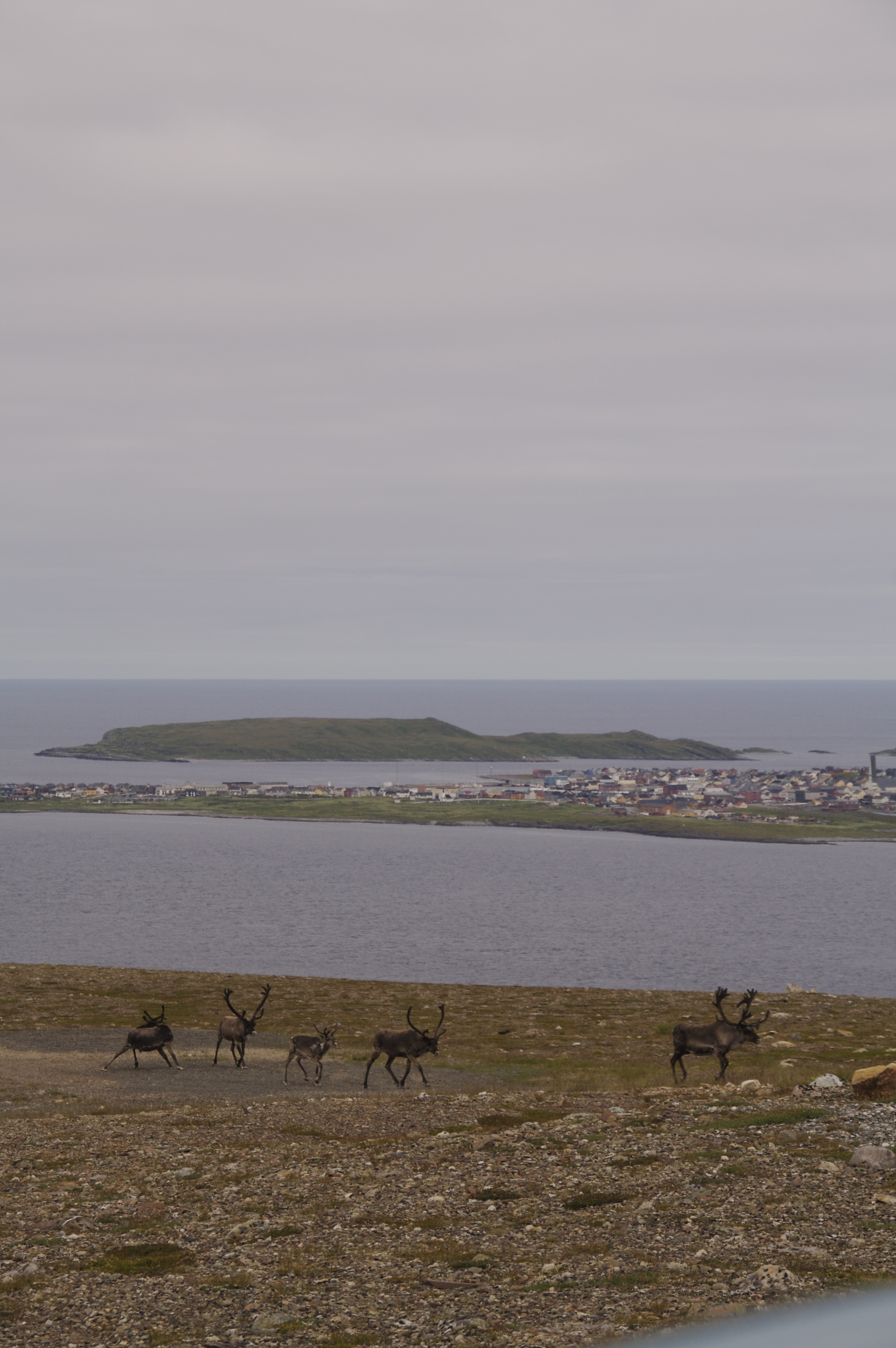 Vardø